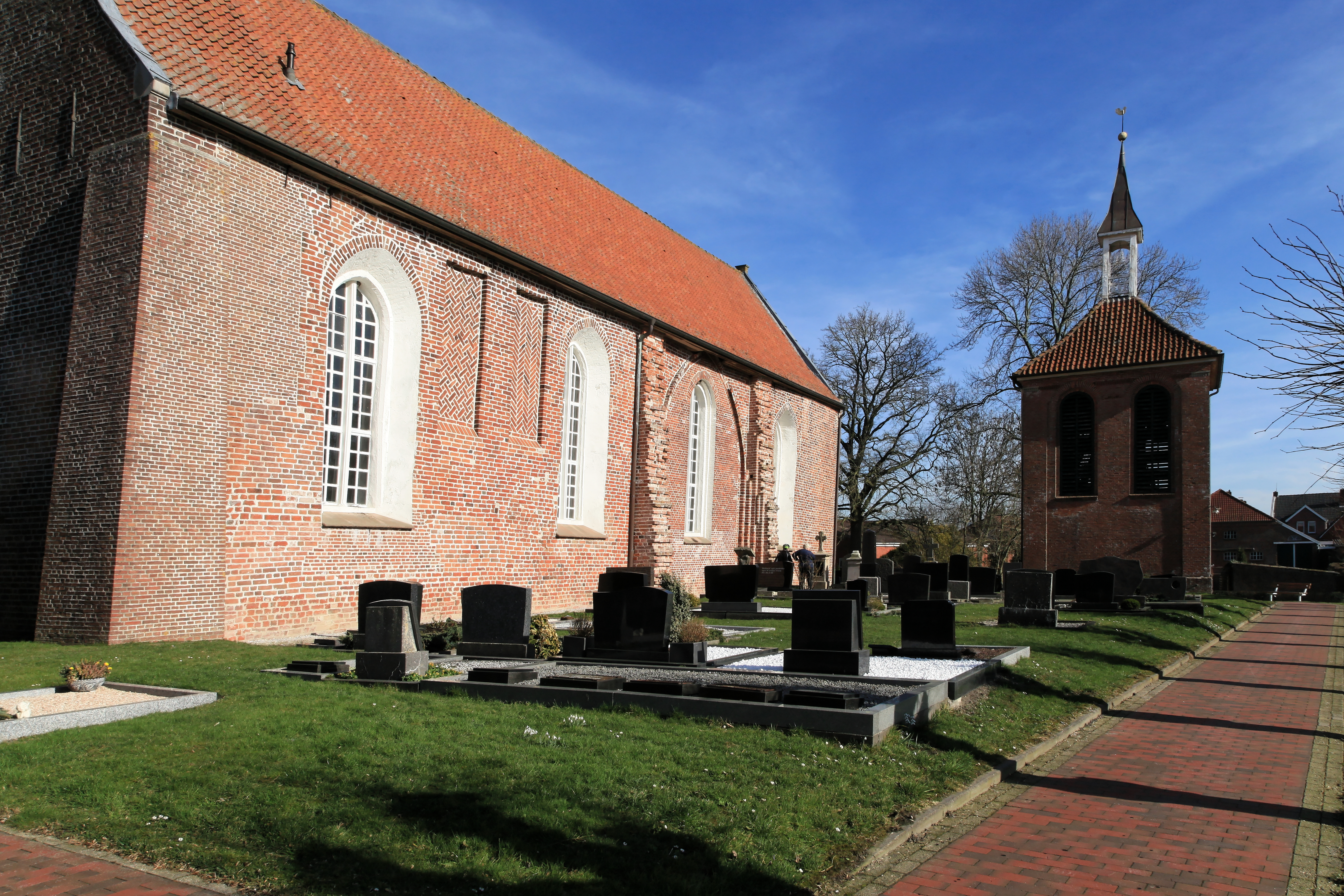 Friedhof, St.-Sebastians-Kirche und Glockenturm, Karkgang in Hatzum, Jemgum